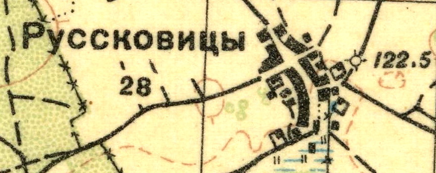 Топографическая карта Ленинградской области, квадрат О-35-23-Г (Волосово), деревня Руссковицы